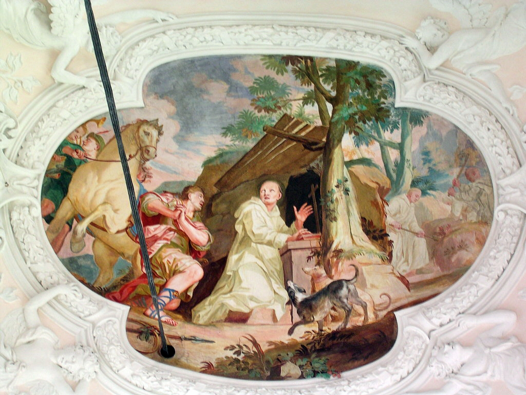 Deckenfresken im Kartausenmuseum Buxheim